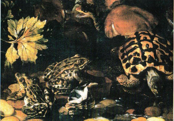 detail